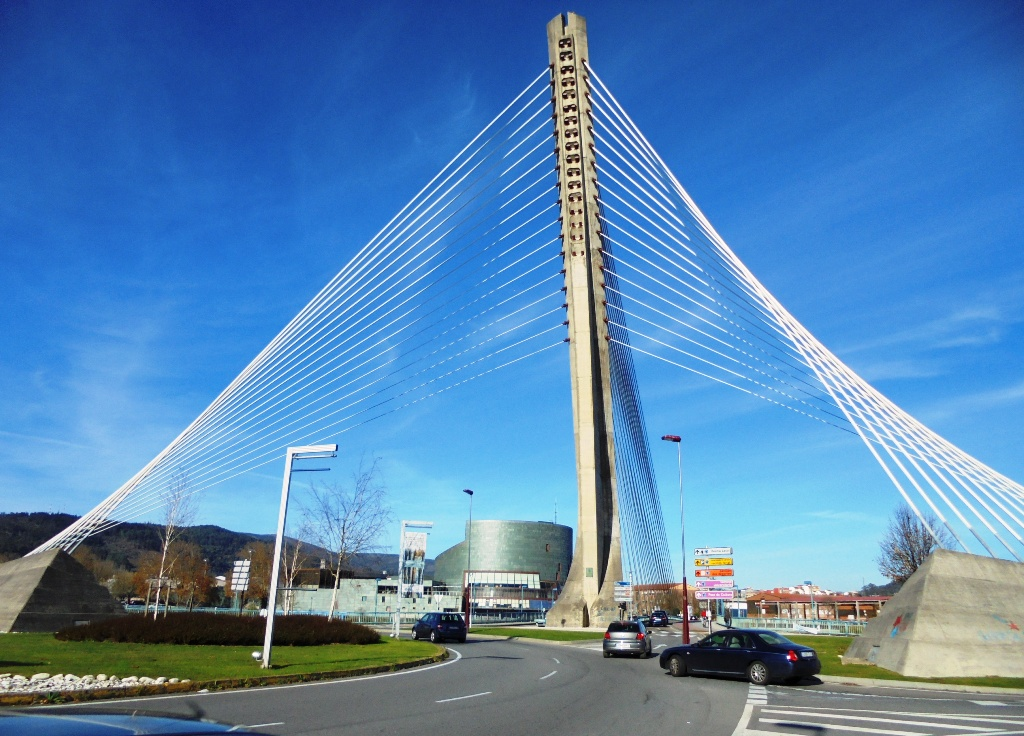 Puente de los Tirantes, Torre y haces de cables en Pontevedra capital